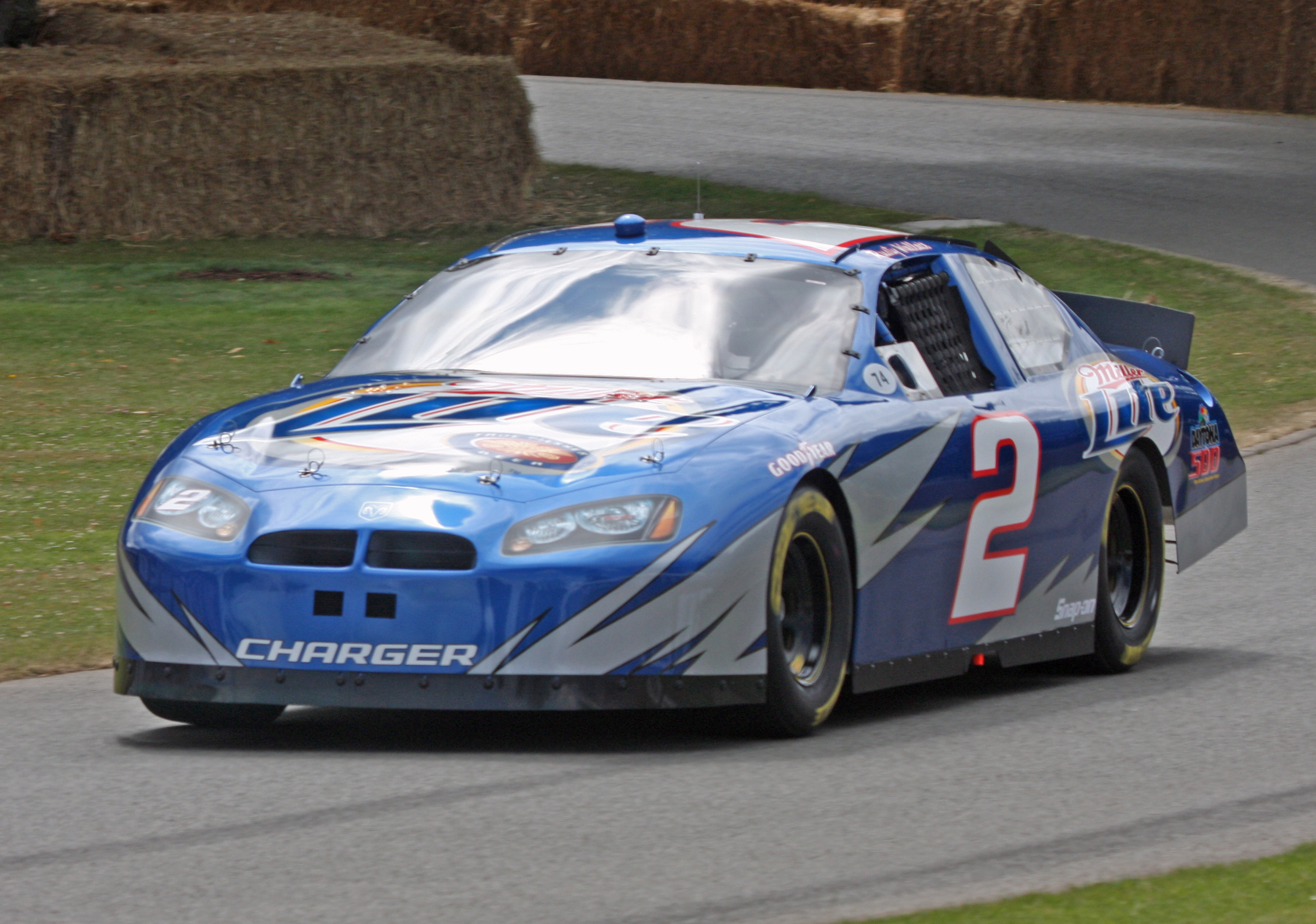 2005 Dodge Charger